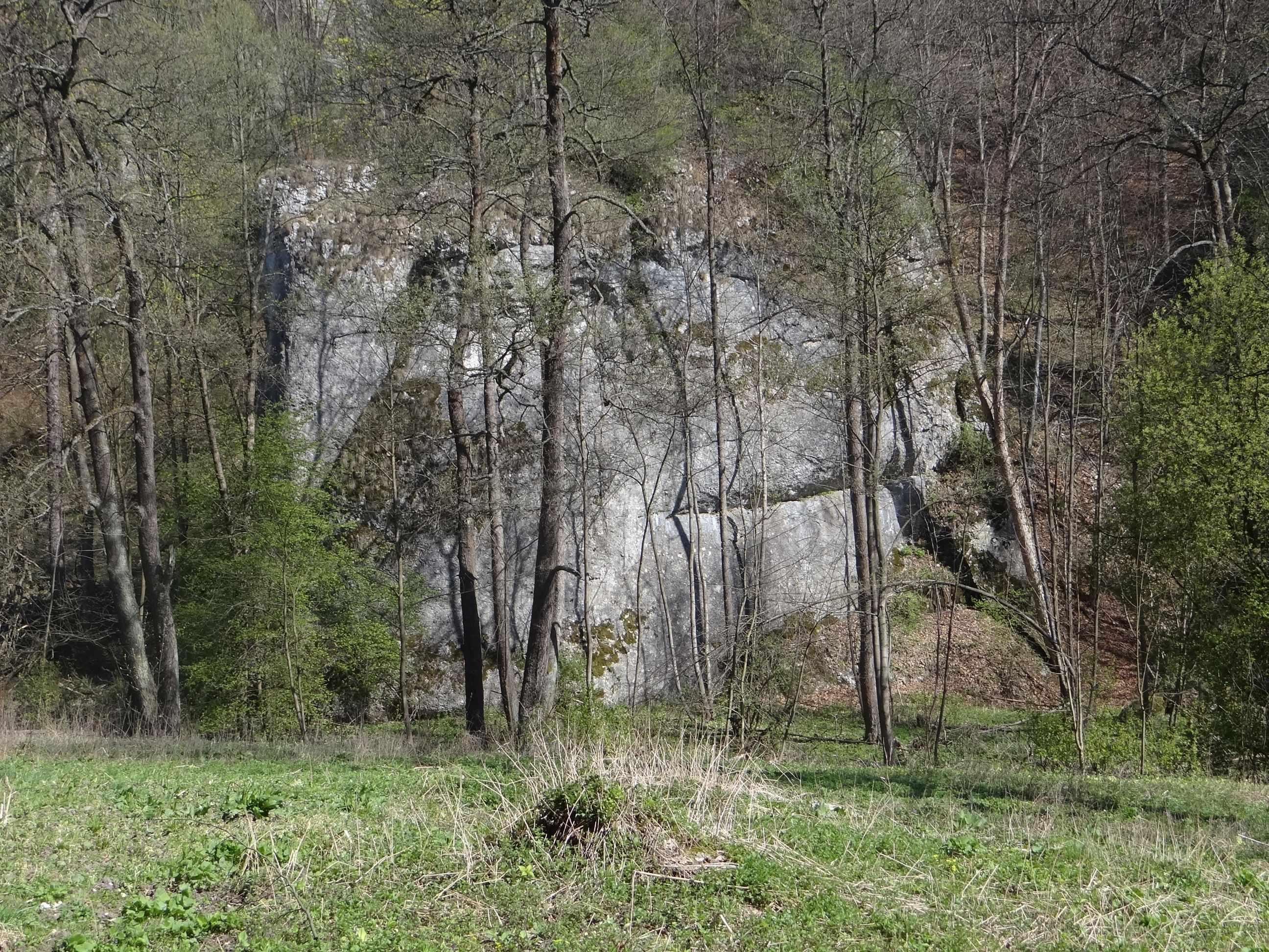 Skały Framugi w Dolinie Sąspowskiej